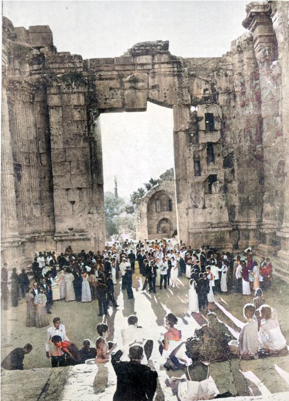 صورة تبيّن آثار مدينة بعلبك اللبانية القديمة، عام ١٩٦٦